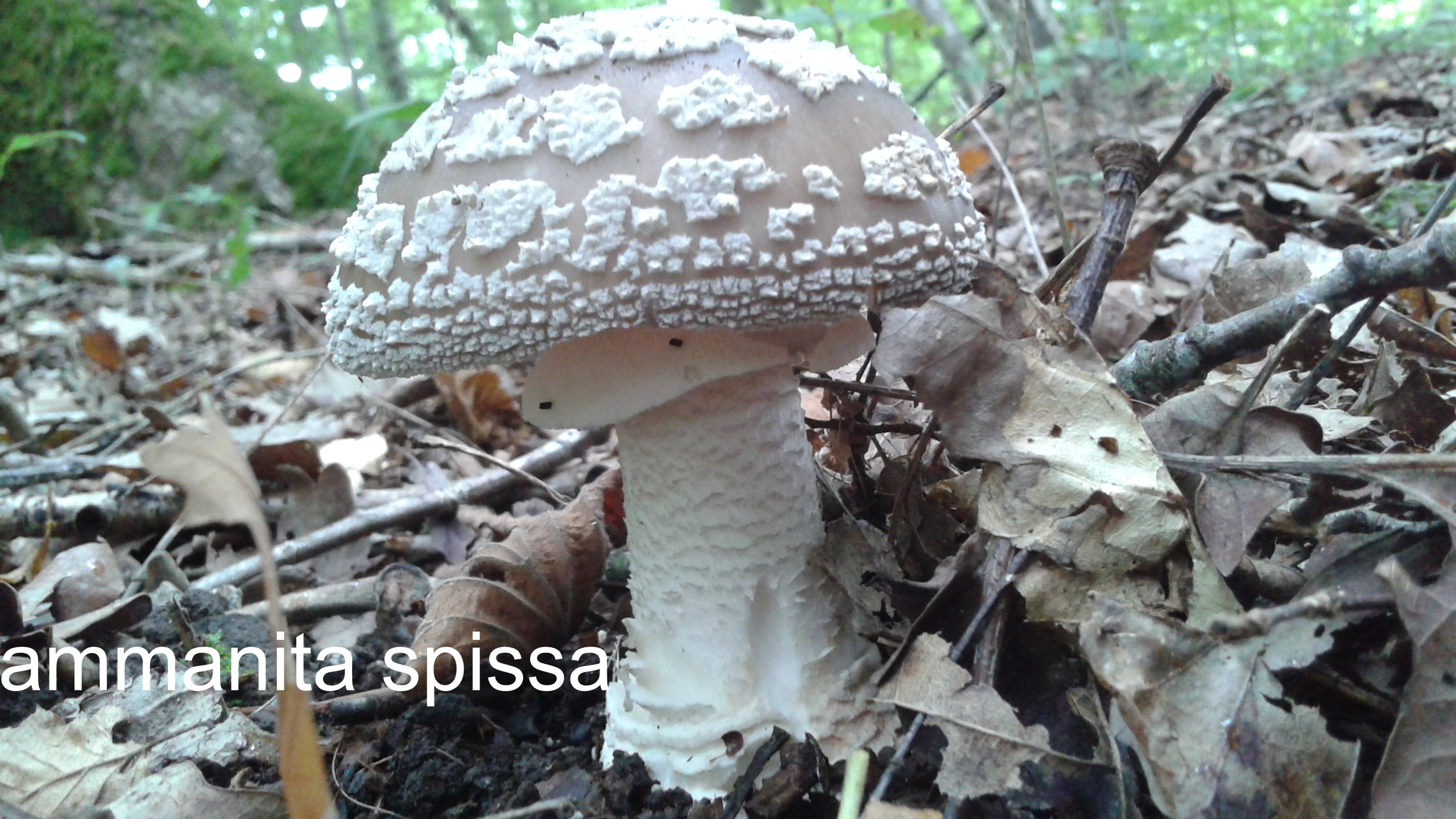 champignon amanita spissa stade jeune